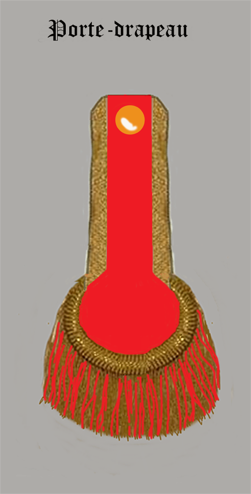 Porte drapeau de l'armée française“